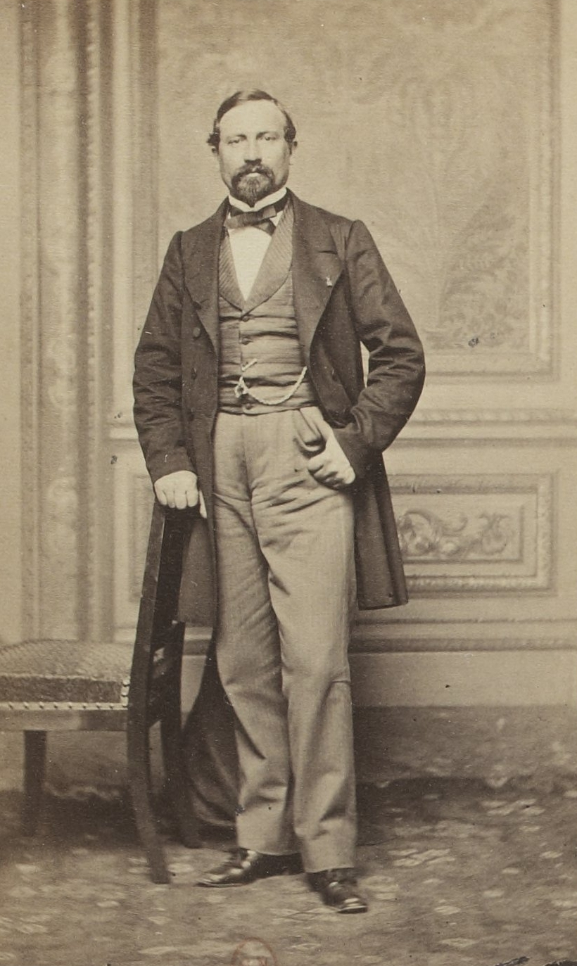 Album des députés au Corps législatif entre 1852-1857.